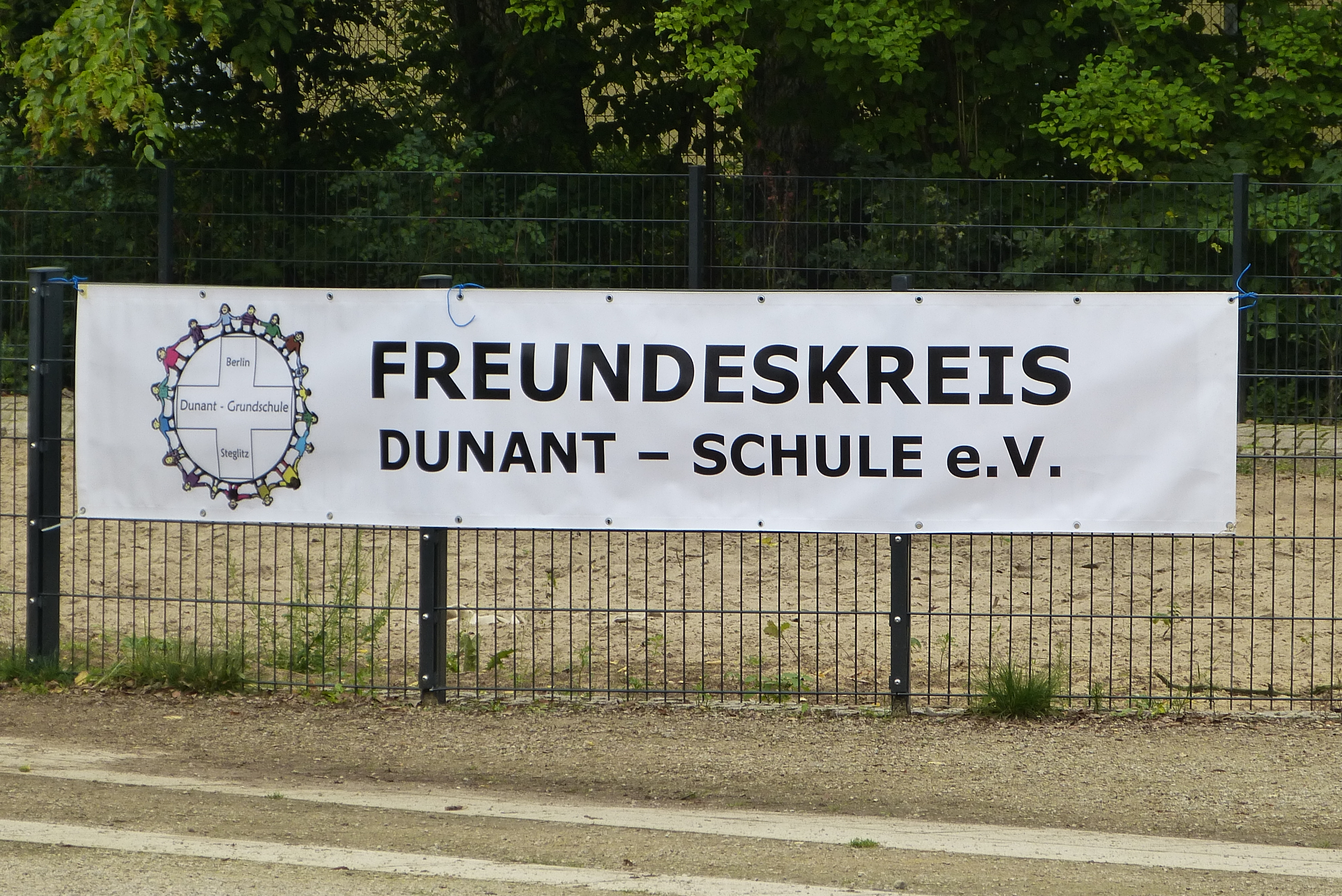 Banner des Freundeskreises der Dunant-Grundschule in Berlin-Steglitz